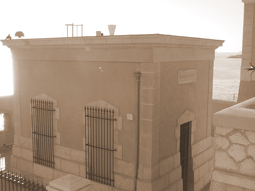 maregraphe de Marseille